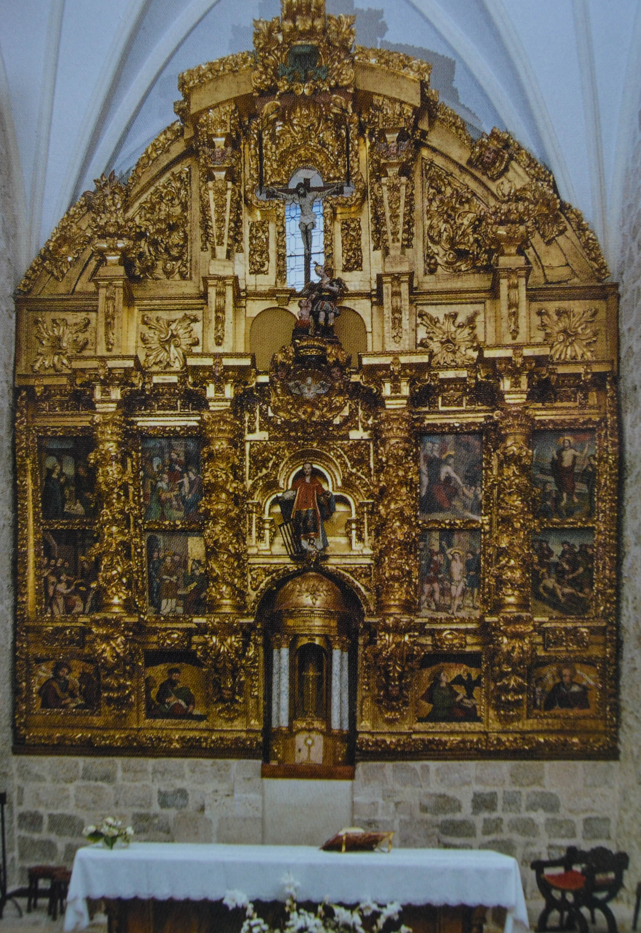 Foto del retablo mayor de la iglesia de Villafruela. Todos los derechos reservados.